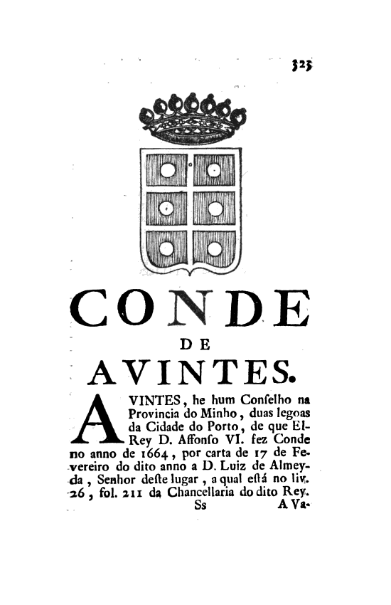 Antonio Caetano de Sousa: "Memorias Historicas e Genealogicas dos Grandes de Portugal", 3.a ed., 1755, p. 137 - Marqueses de Lavradio